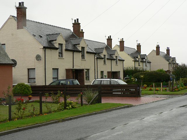 Houses at Balkeerie, Angus